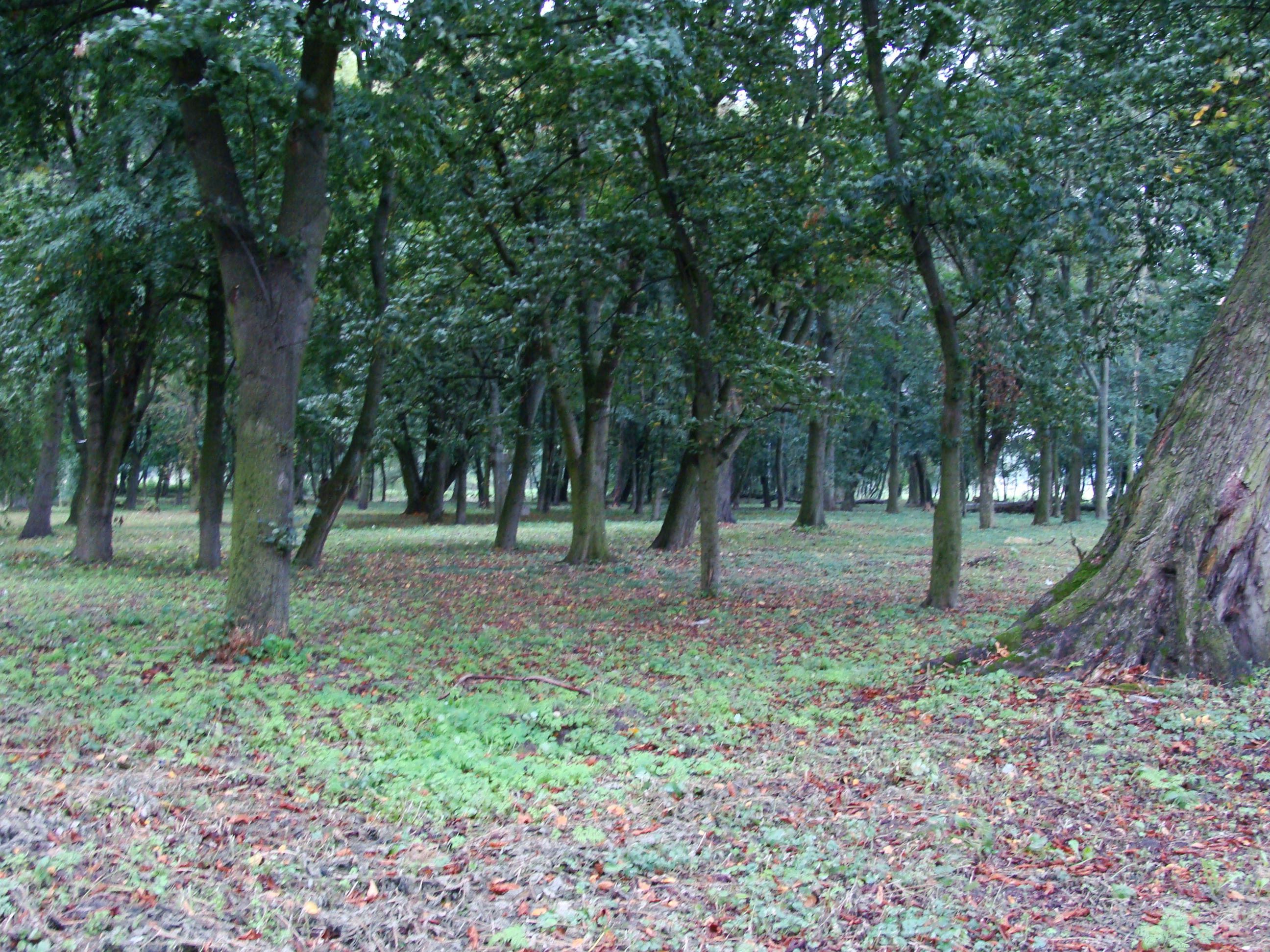 Kobylniki - park, w zespole dworskim, XIX, pocz. XX 12.1990 i z 16.09.1994.